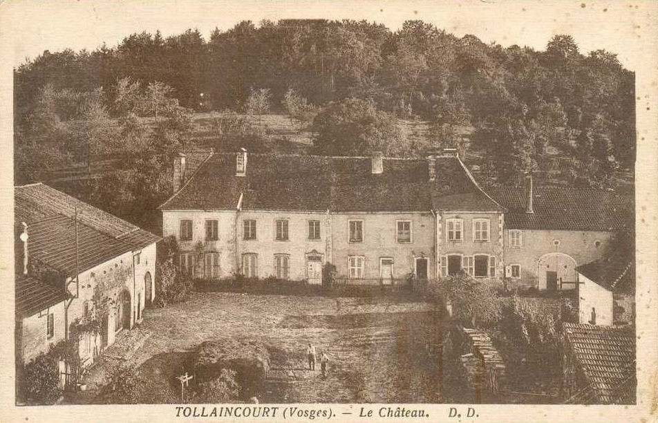 Vue d'ensemble du château de Tollaincourt au début du XXème siècle